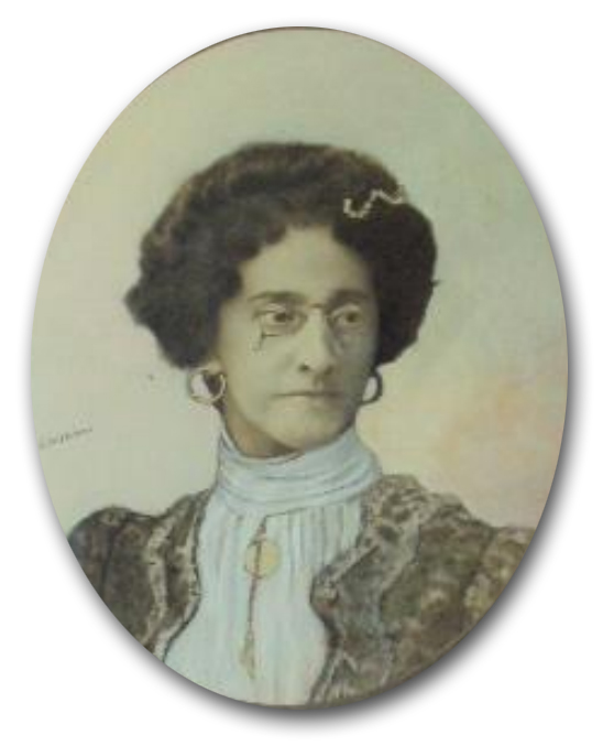 Retrato da poetisa brasileira Revocata Heloisa de Mello.